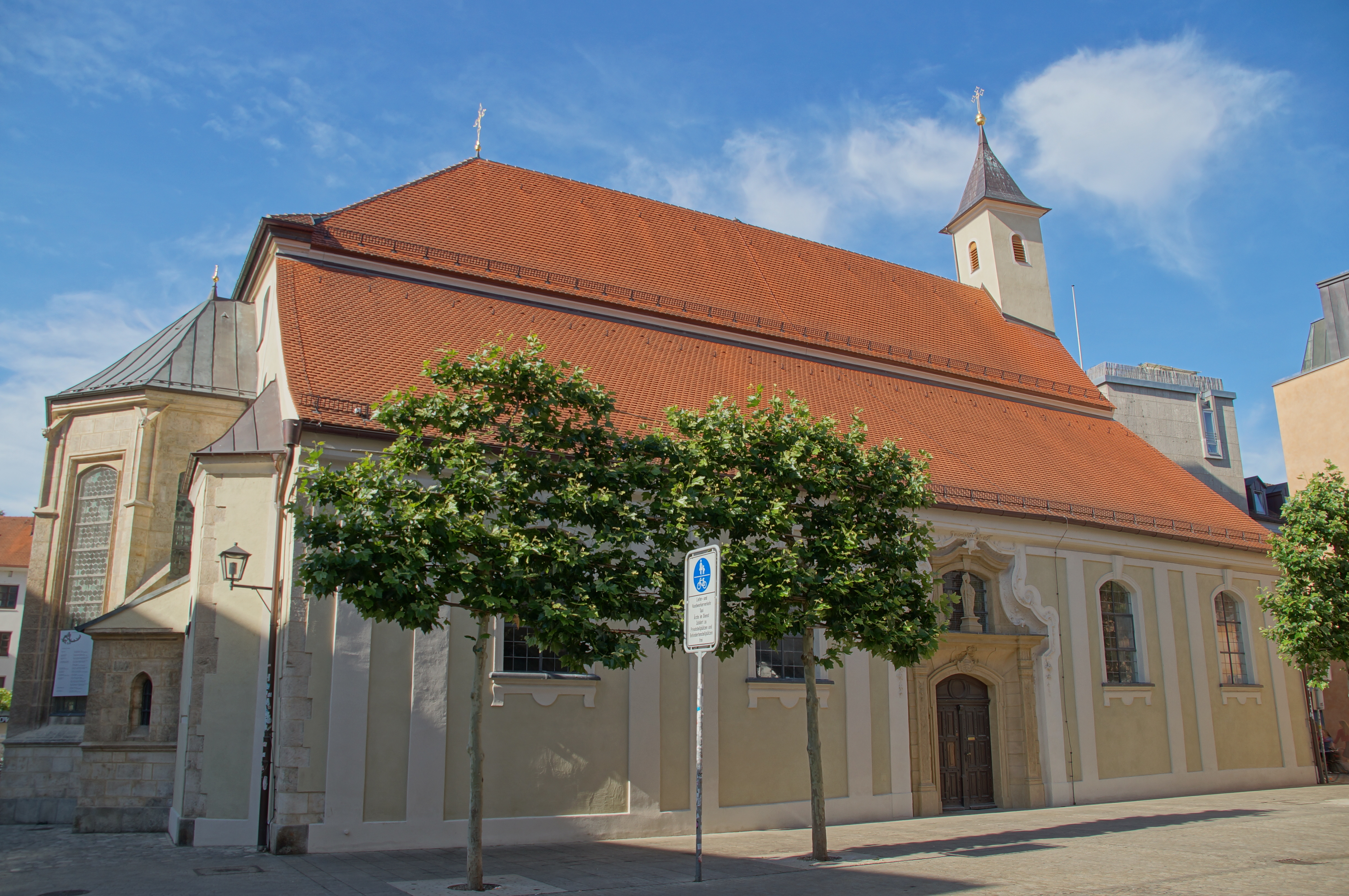 Katholische Pfarrkirche St. Kassian, dreischiffige Staffelhalle mit eingezogenem Polygonalchor und Seitenapsiden, Walm- und Pultdach, im Kern frühgotisch, um 1300, 1477 erweitert und umgebaut, 1749–60 Rokoko-Umgestaltung; mit Ausstattung This is a photograph of an architectural monument.